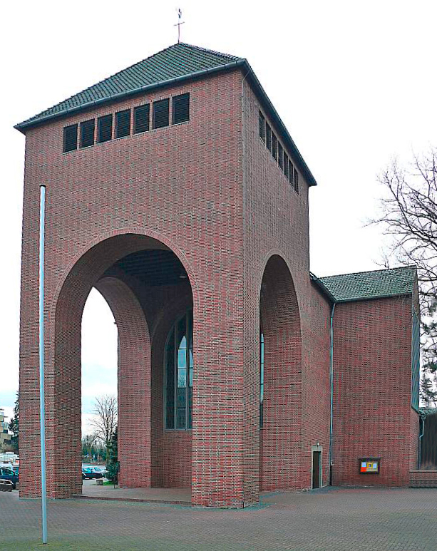 Heilig-Kreuz-Kirche Bocholt, Architekt: Dominikus Böhm